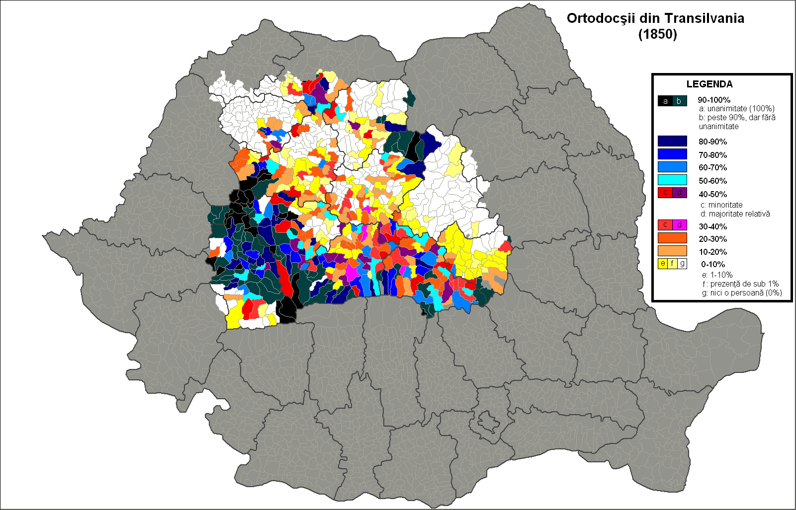 Ortodocşii din Principatul Transilvaniei (1850).